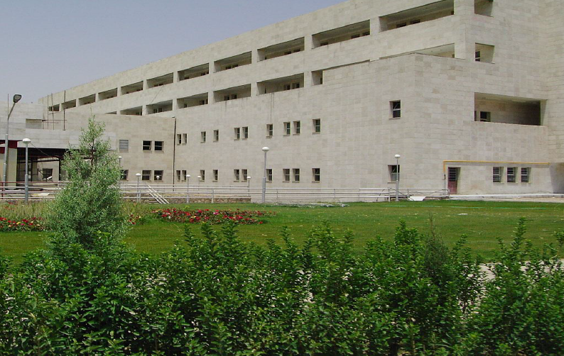 بیمارستان ولی‌عصر فسا